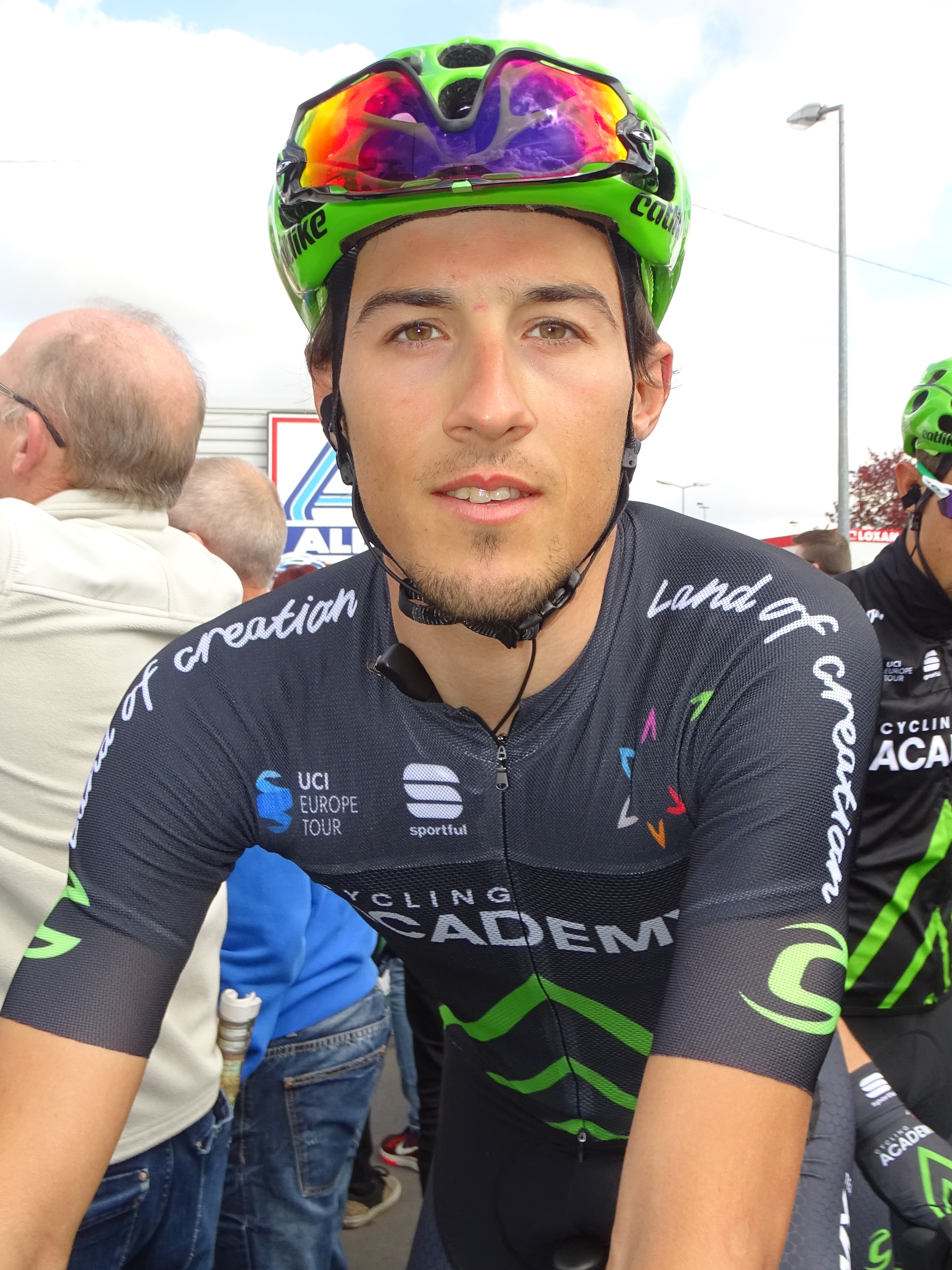 Reportage réalisé le jeudi 13 avril à l'occasion du départ et de l'arrivée du Grand Prix de Denain 2017 à Denain, Nord, Nord-Pas-de-Calais-Picardie, France.